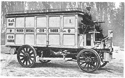 Lastwagen der "Österreichischen Daimler-Motoren-Commanditgesellschaft Bierenz, Fischer & Cie." als Eiswagen adaptiert der Wiener Krystall-Eis-Fabrik. Karosserie Jacob Lohner. Baujahr 1901.